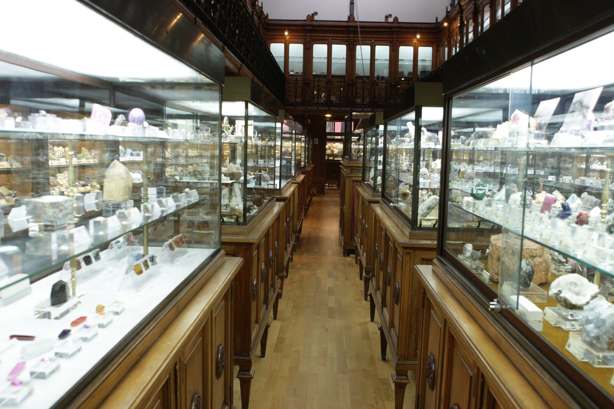 Sección de mineralogía del Museo de la Escuela de Ingenieros de Minas de madrid